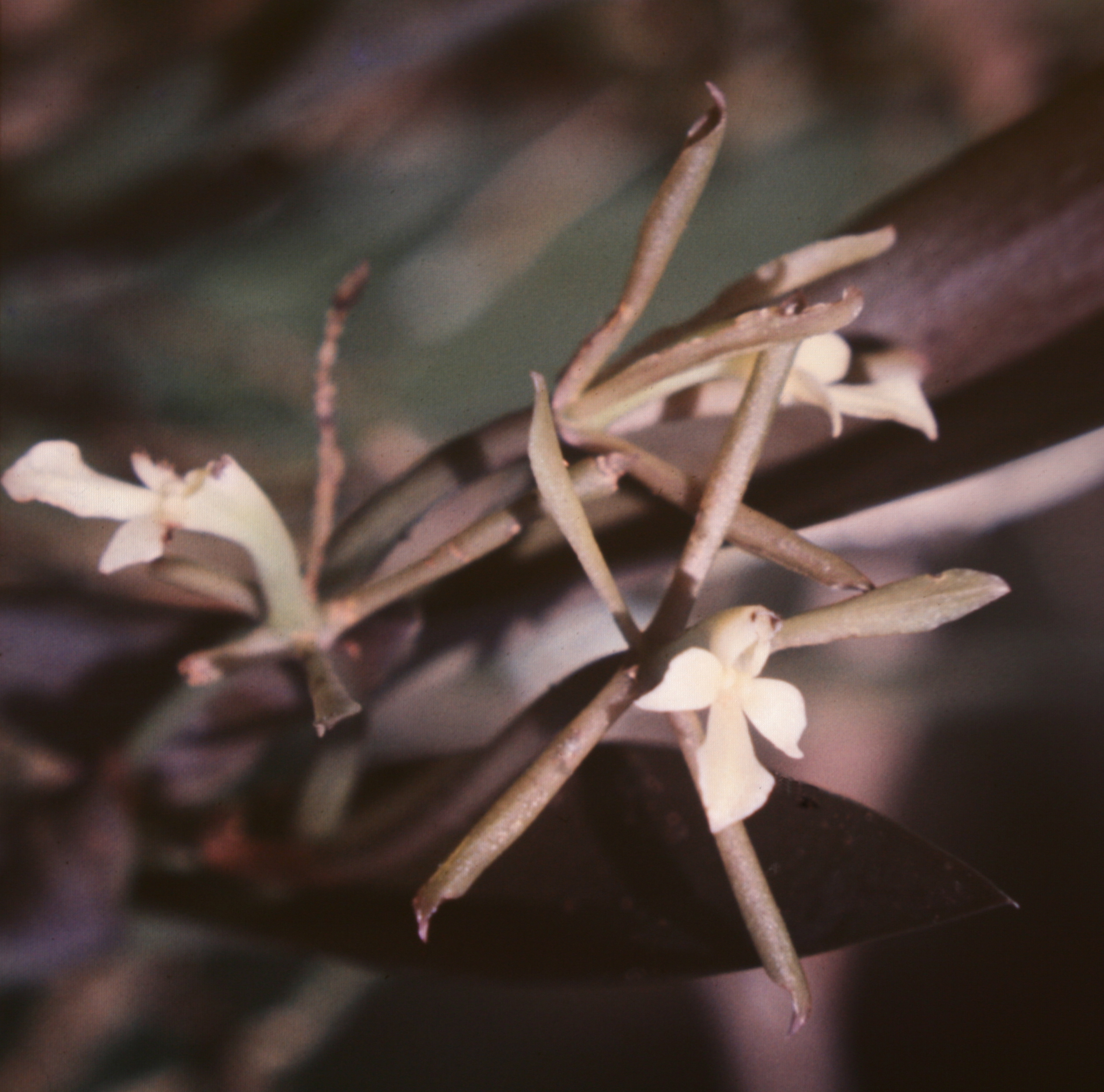 Epidendrum purpurascens, Suriname.